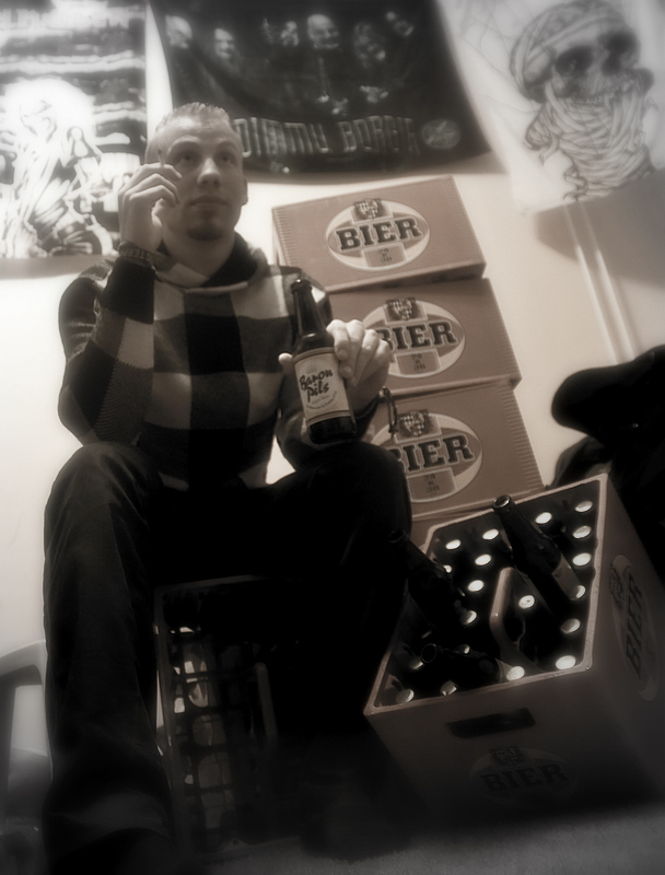 Filmmaker Erwin Zijlstra